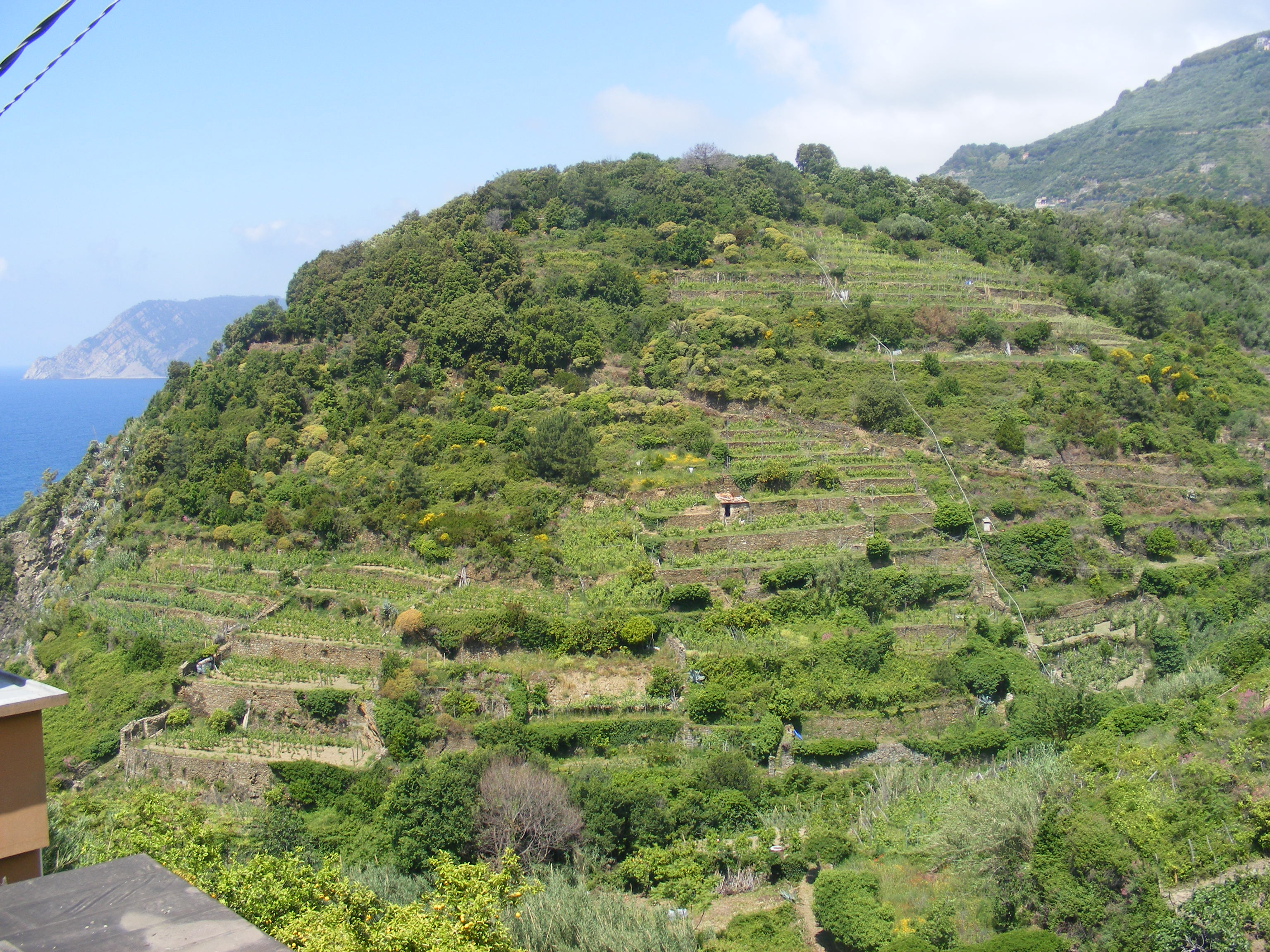 Weinberg mit Monorackbahn in Corniglia, Cinque Terre, Italien